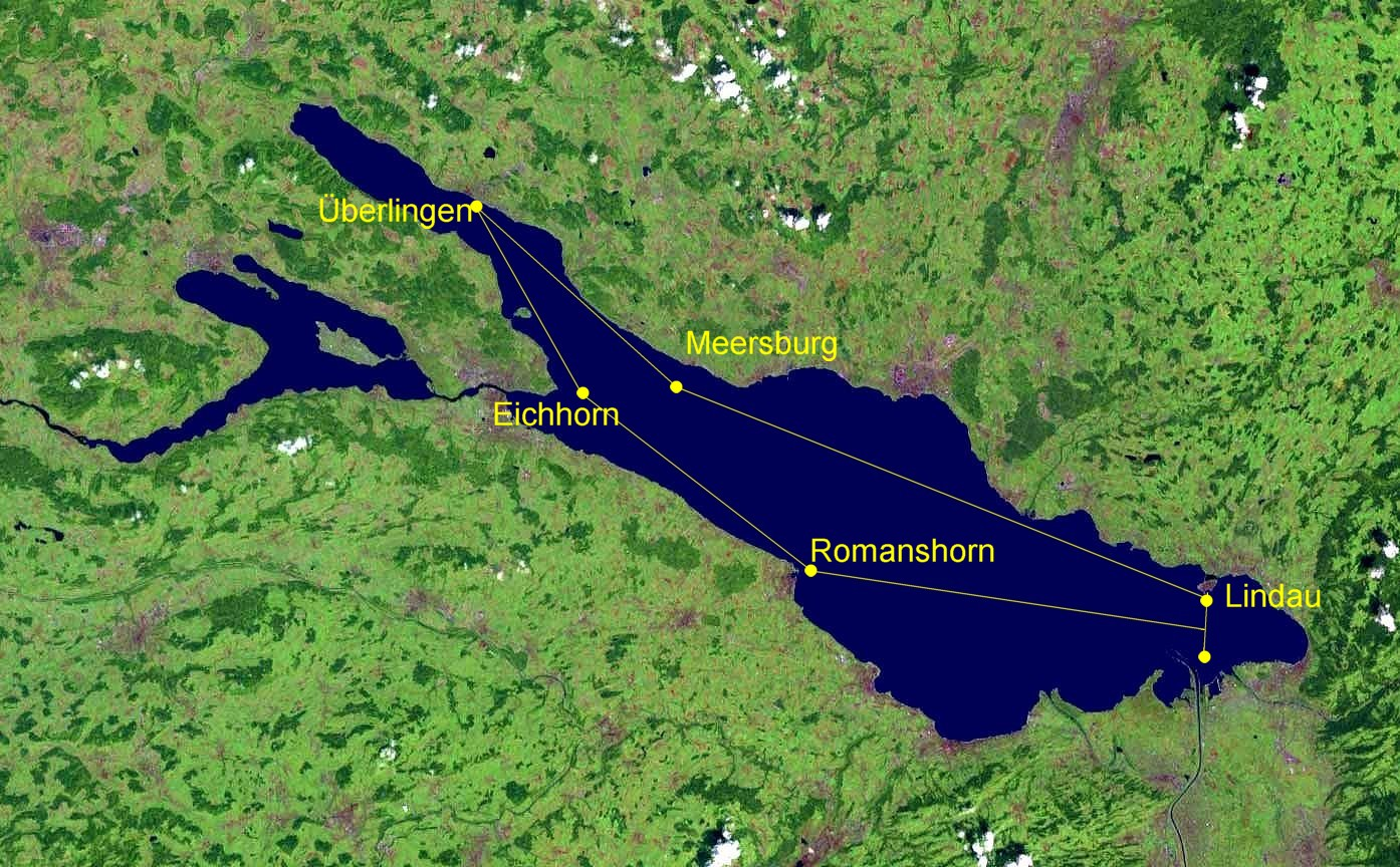 Strecke der Segelregatta Rund um den Bodensee, abgeleitet vom Satellitenbild Bild:Bodensee satellit.jpg